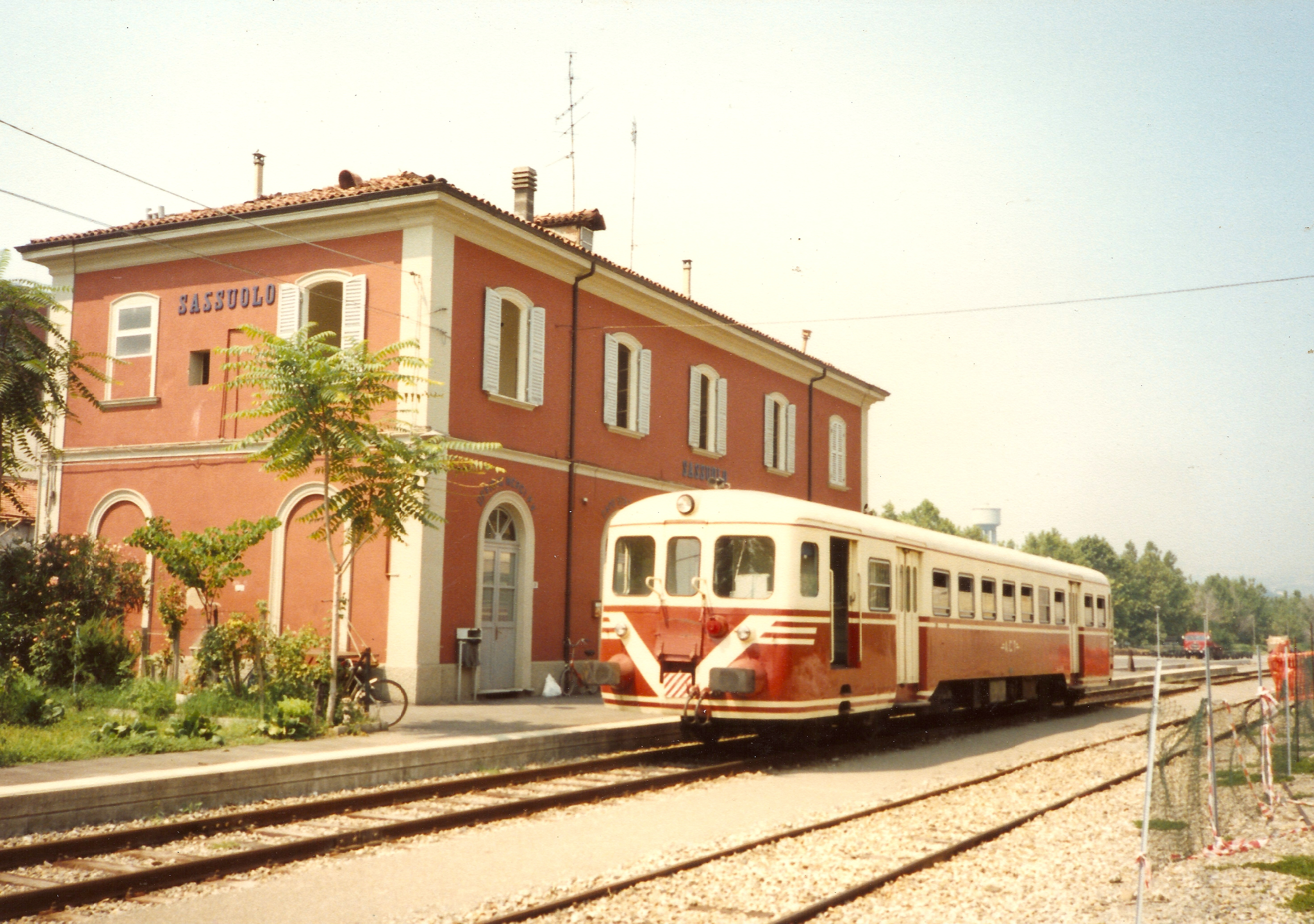 Automotrice ALn 2456 dell'ACT in sosta a Sassuolo